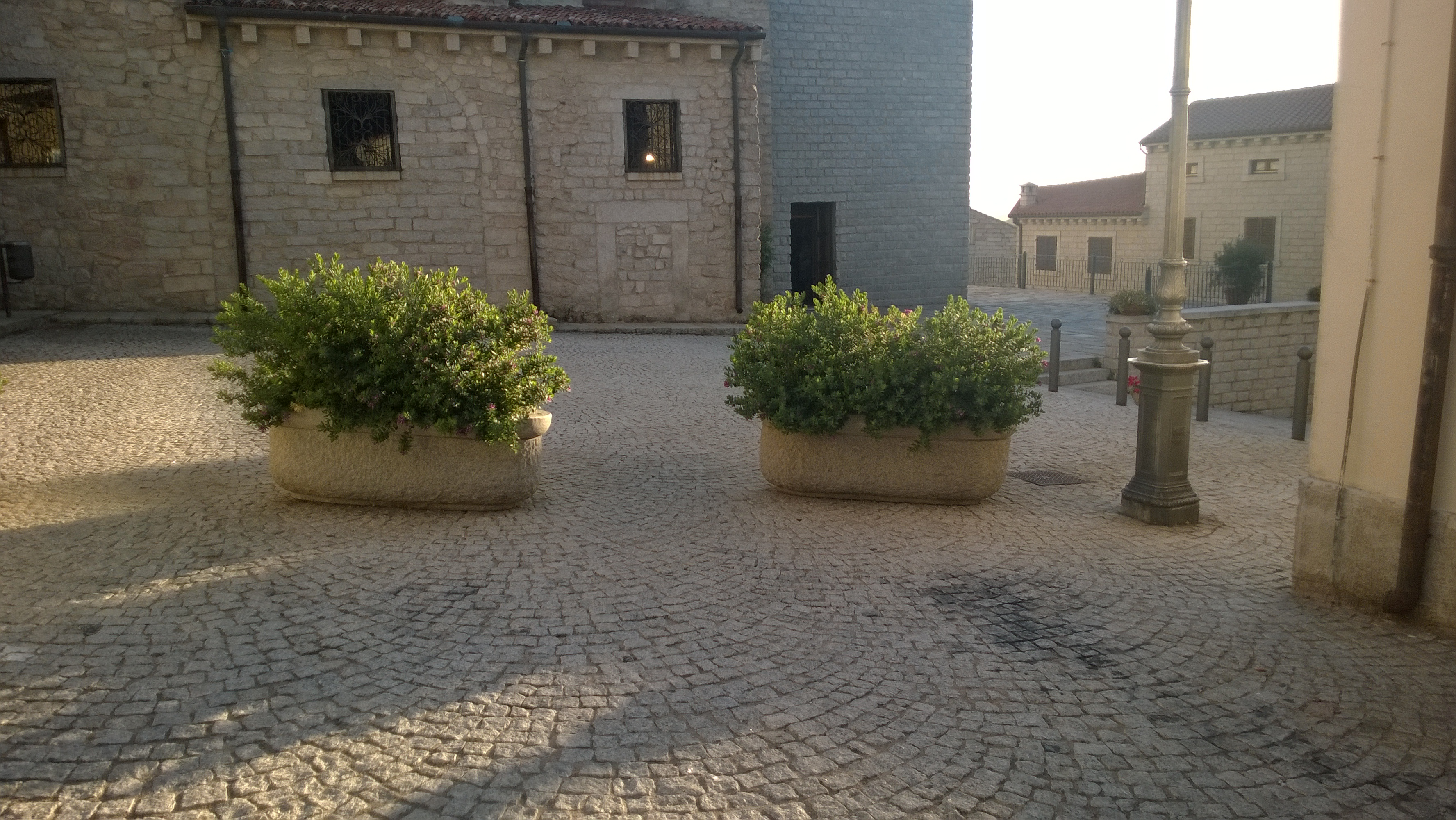 Piazza Santa Giusta,edificata sul colle Santa Justa. Qui situano la chiesa parrocchiale di Santa Giusta e l'oratorio di Santa Croce.